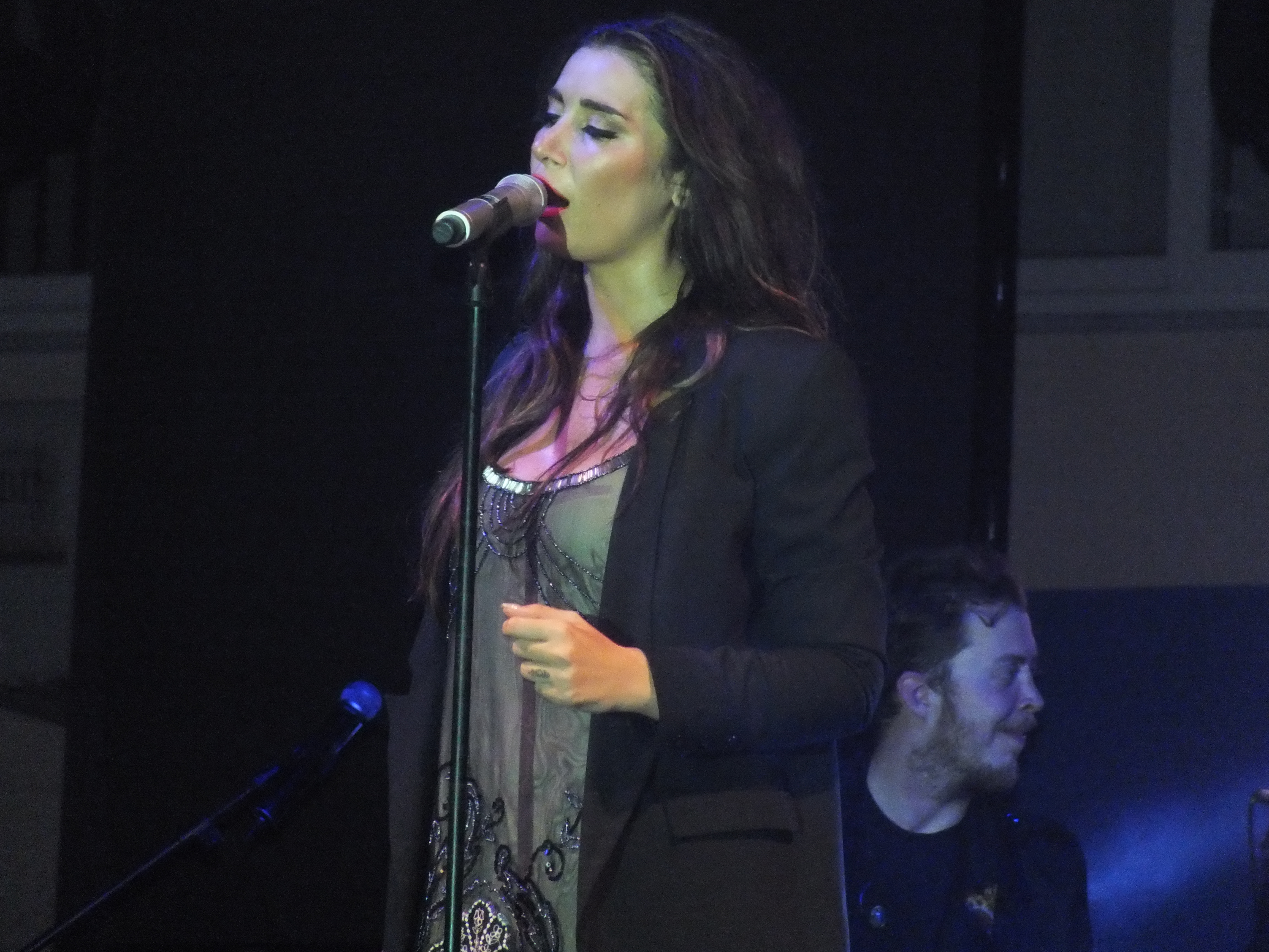 2012 Silifke Bahar Konserleri'nden bir kare.